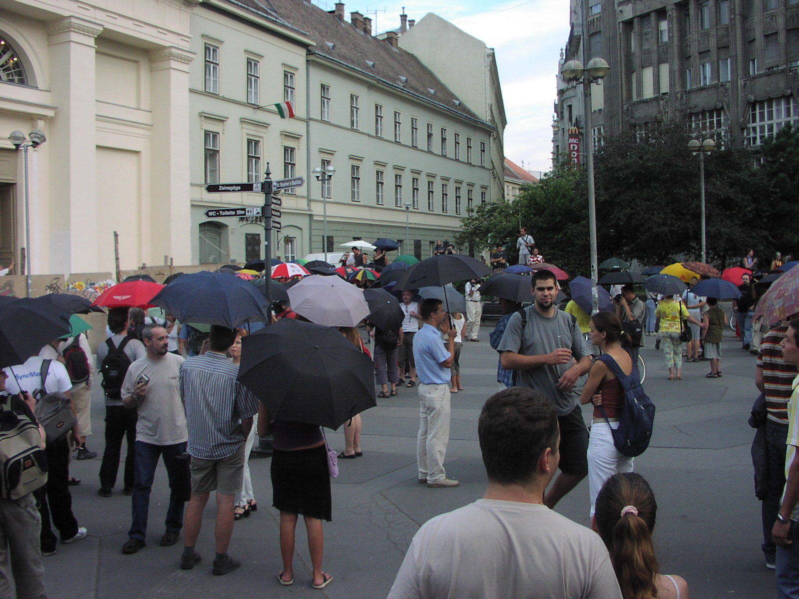 Az első magyar flash mob a Deák téren, Budapest